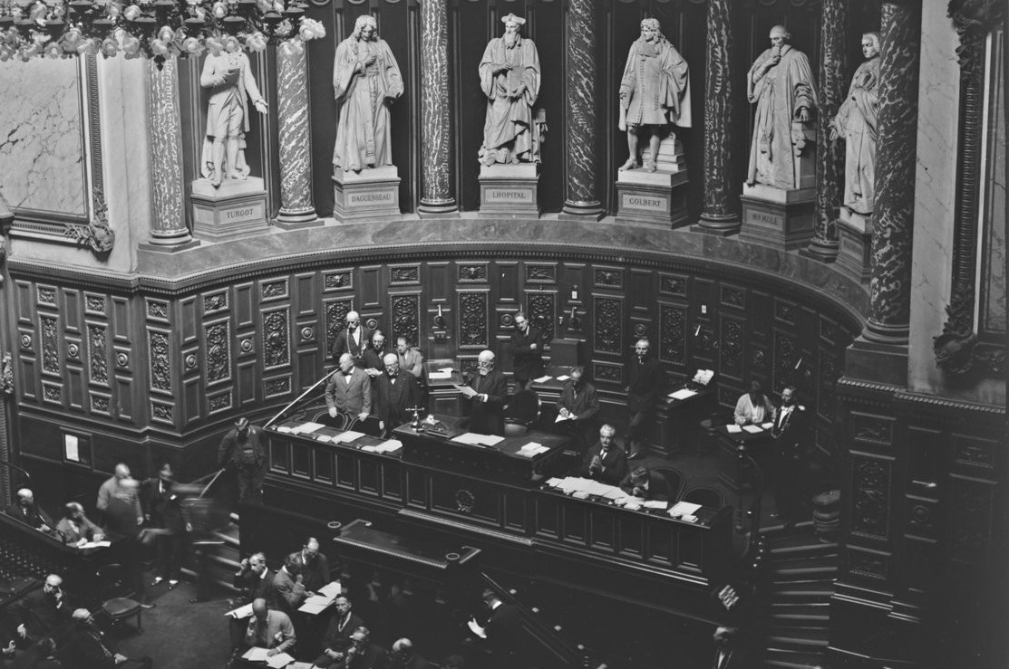 Paul Doumer s'exprimant lors de la XXIVe conférence interparlementaire, dont il préside les débats en tant que président du Sénat français.